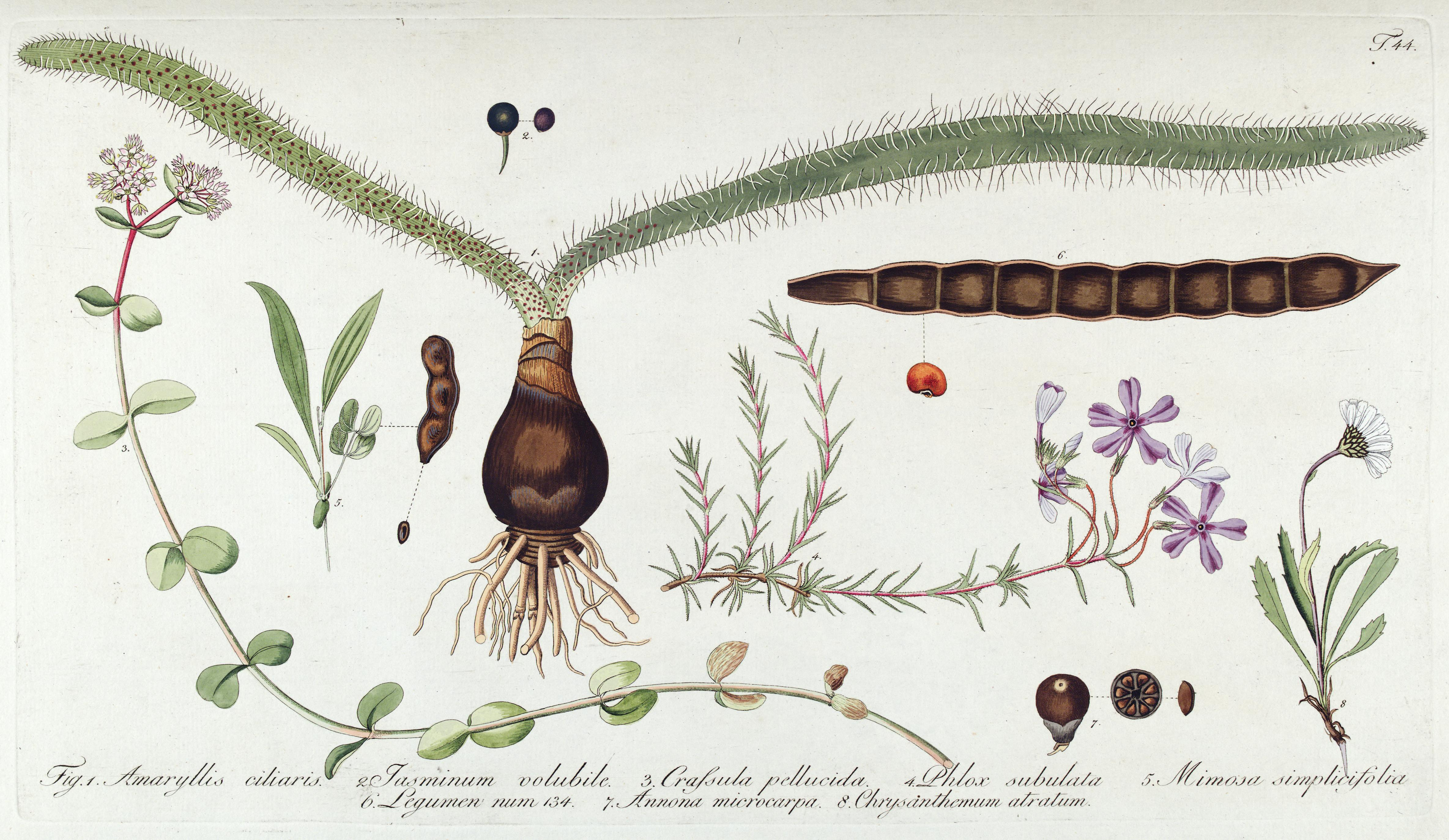 Fragmenta botanica, figuris coloratis illustrata :ab anno 1800 ad annum 1809 per sex fasciculos edita /opera et sumptibus Nicolai Josephi Jacquin.